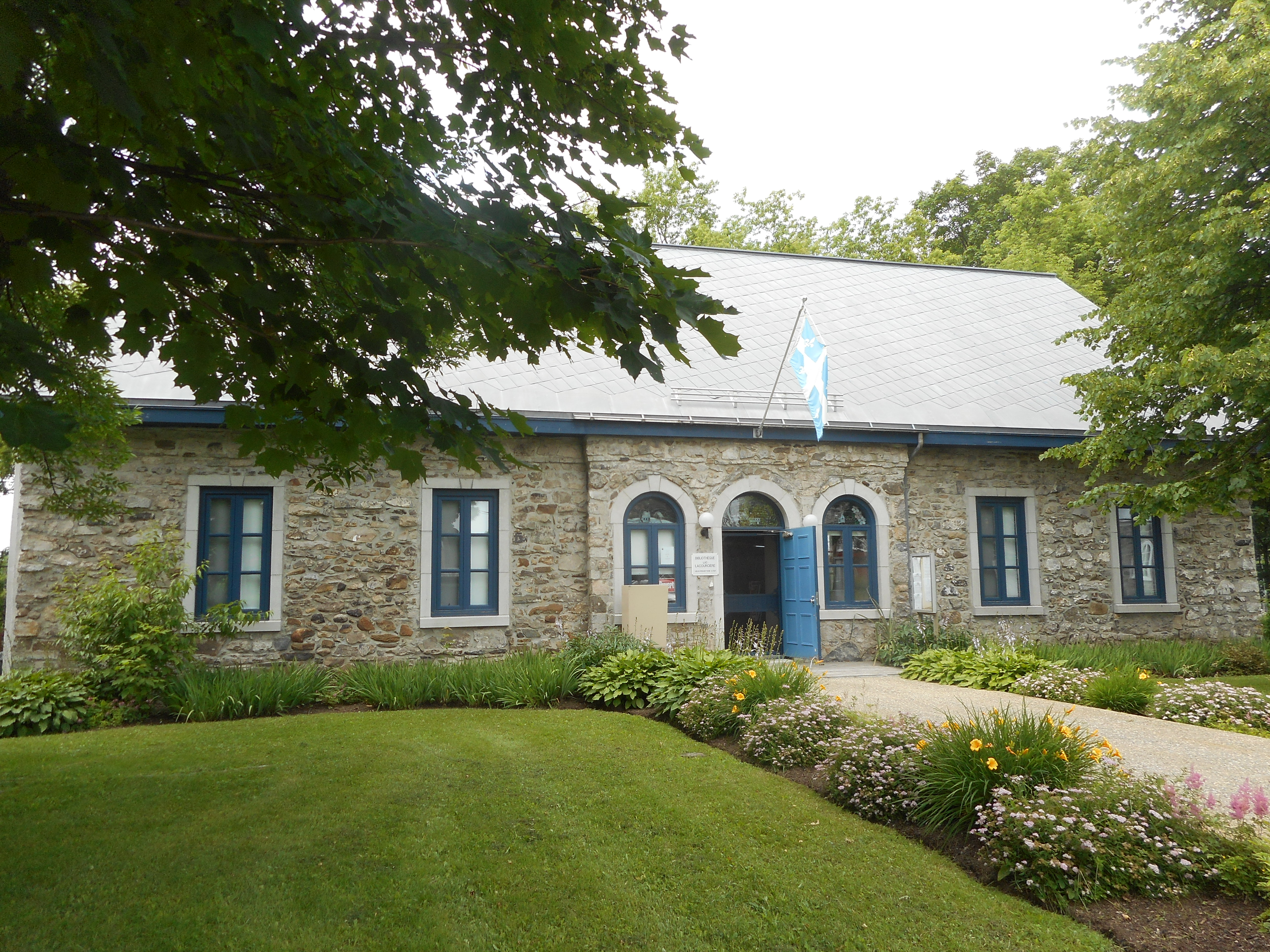 Bibliothèque Luc-Lacourcière, (anciennement vieux presbytère de Beaumont), 64, chemin du Domaine, Beaumont, Québec